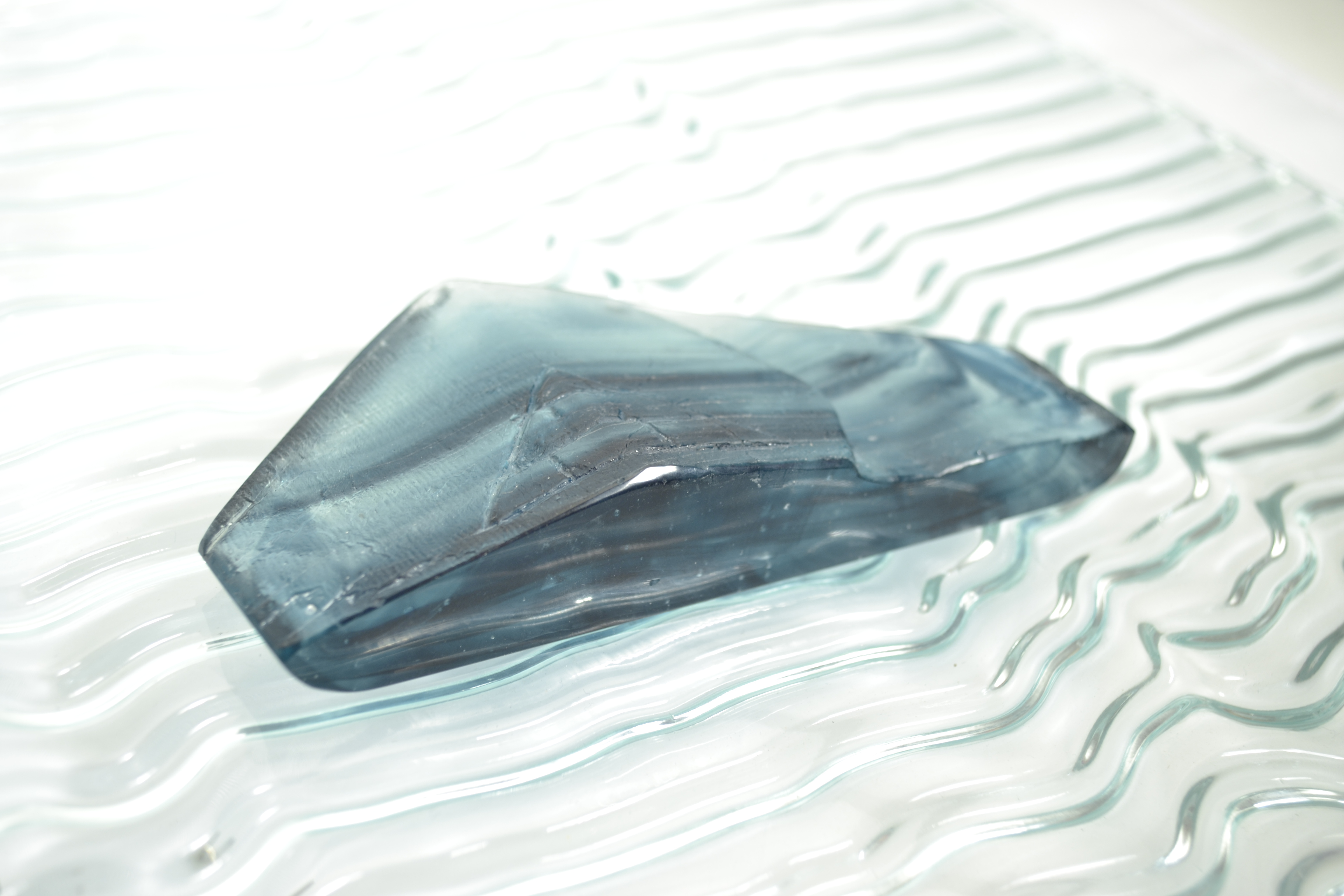 Rzeźba szklana leżąca na szkle z fakturą. Zdjęcie poglądowe